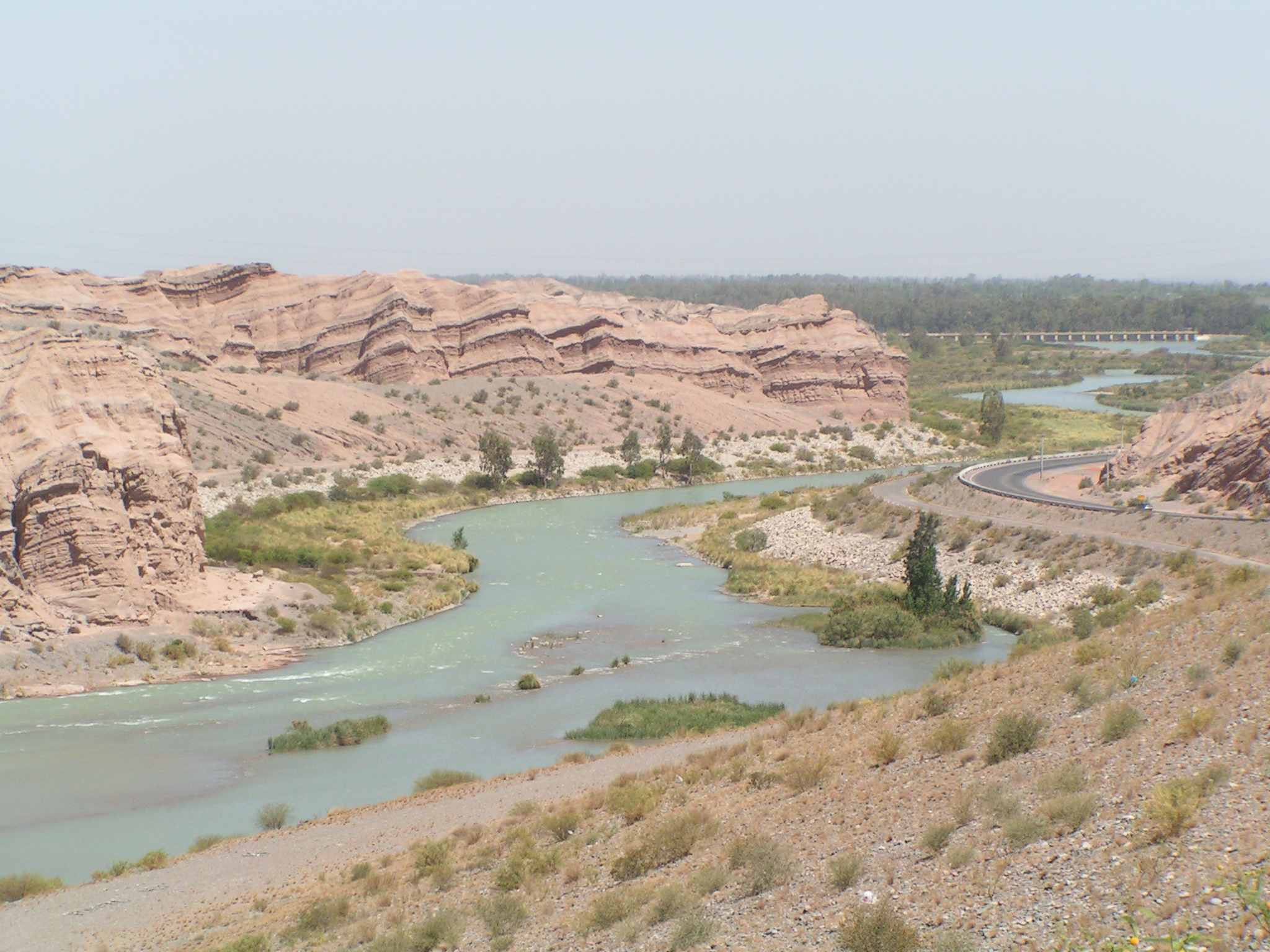 El Río San Juan, en la provincia del mismo nombre, en su paso por la Quebrada de Ullum.